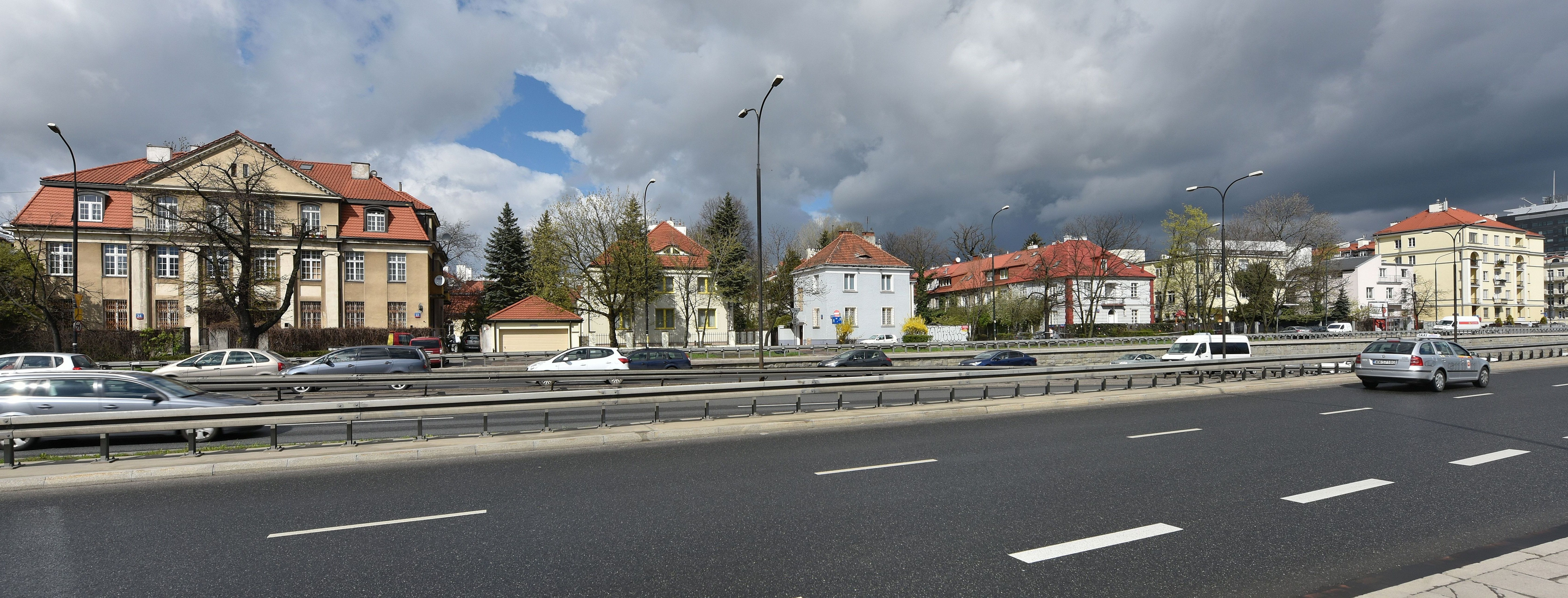 Kolonia Staszica widziana z ul. Wawelskiej